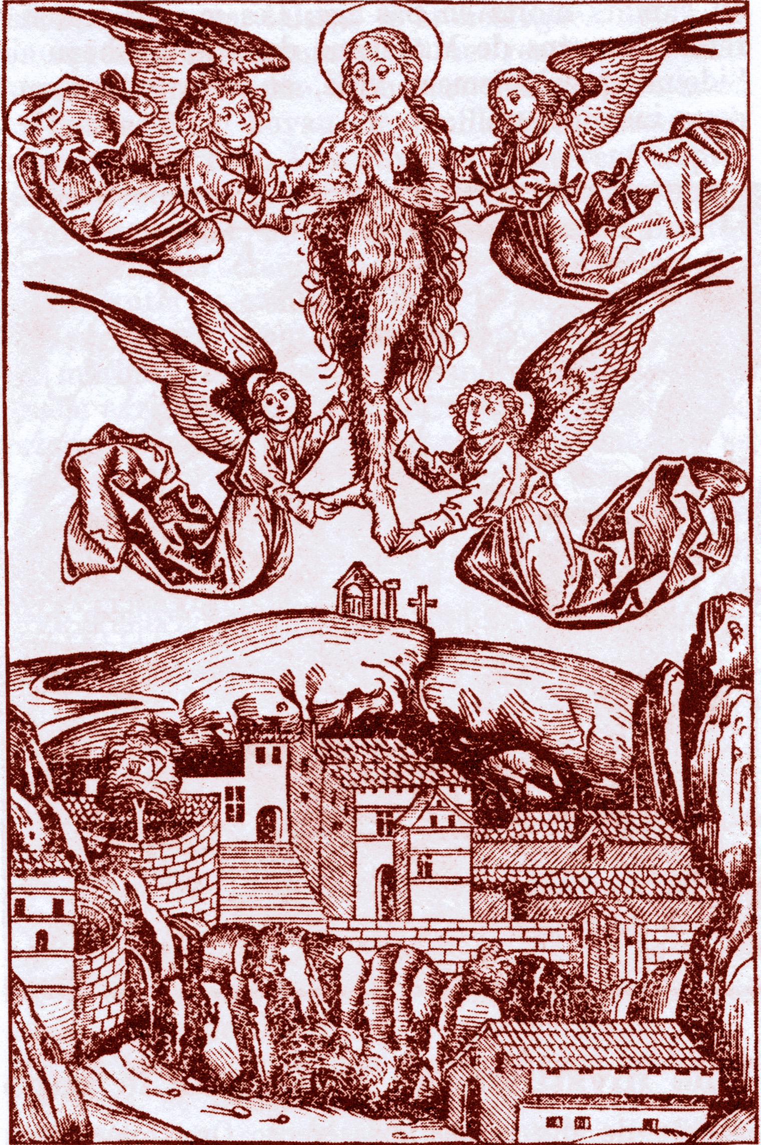 La Madeleine portée par les anges au dessus de la Sainte Baume